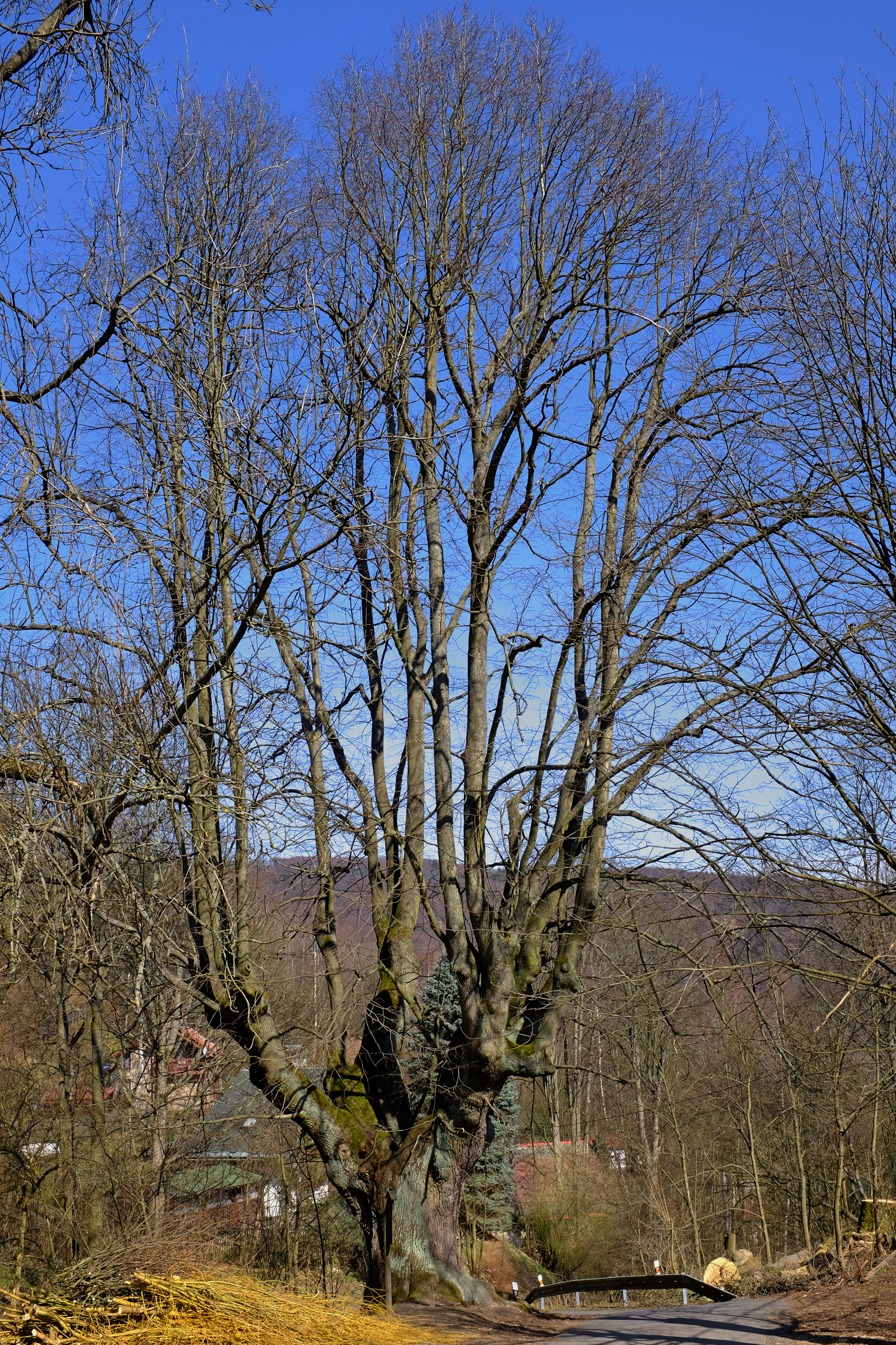 Památný strom - Lípa v Osvinově - Osvinov, Krušné hory, okres Karlovy Vary